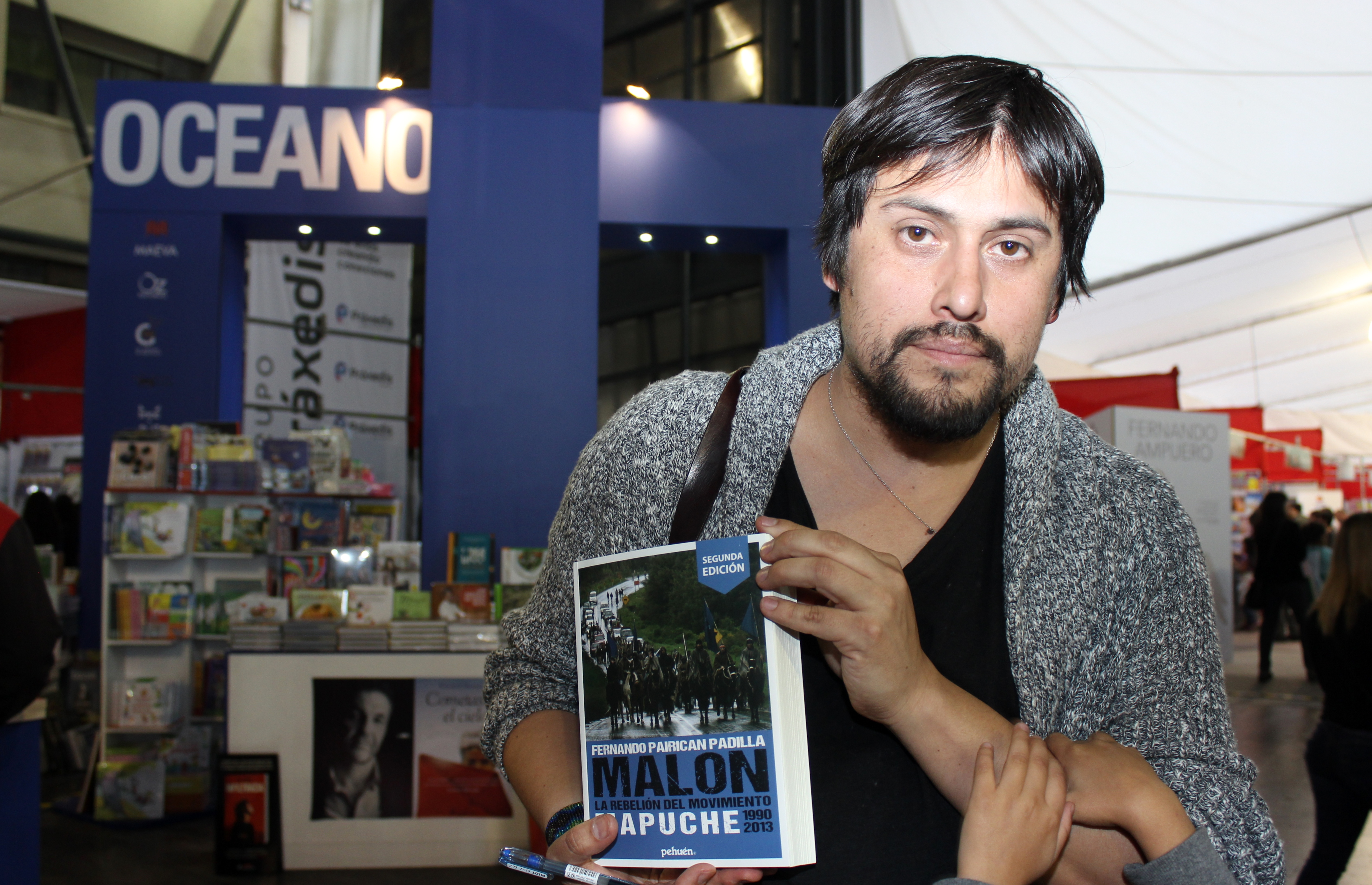 El historiador chileno mapuche Fernando Pairicán, autor del libro Malón. La rebelión del movimiento mapuche, en la Feria Internacional del Libro de Santiago 2018.